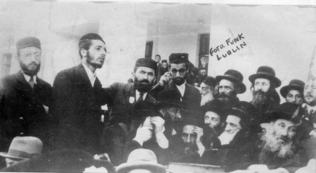 הגאון מקוז'יקלוב הרב אריה צבי פרומר, מחבר ספרים ארץ צבי